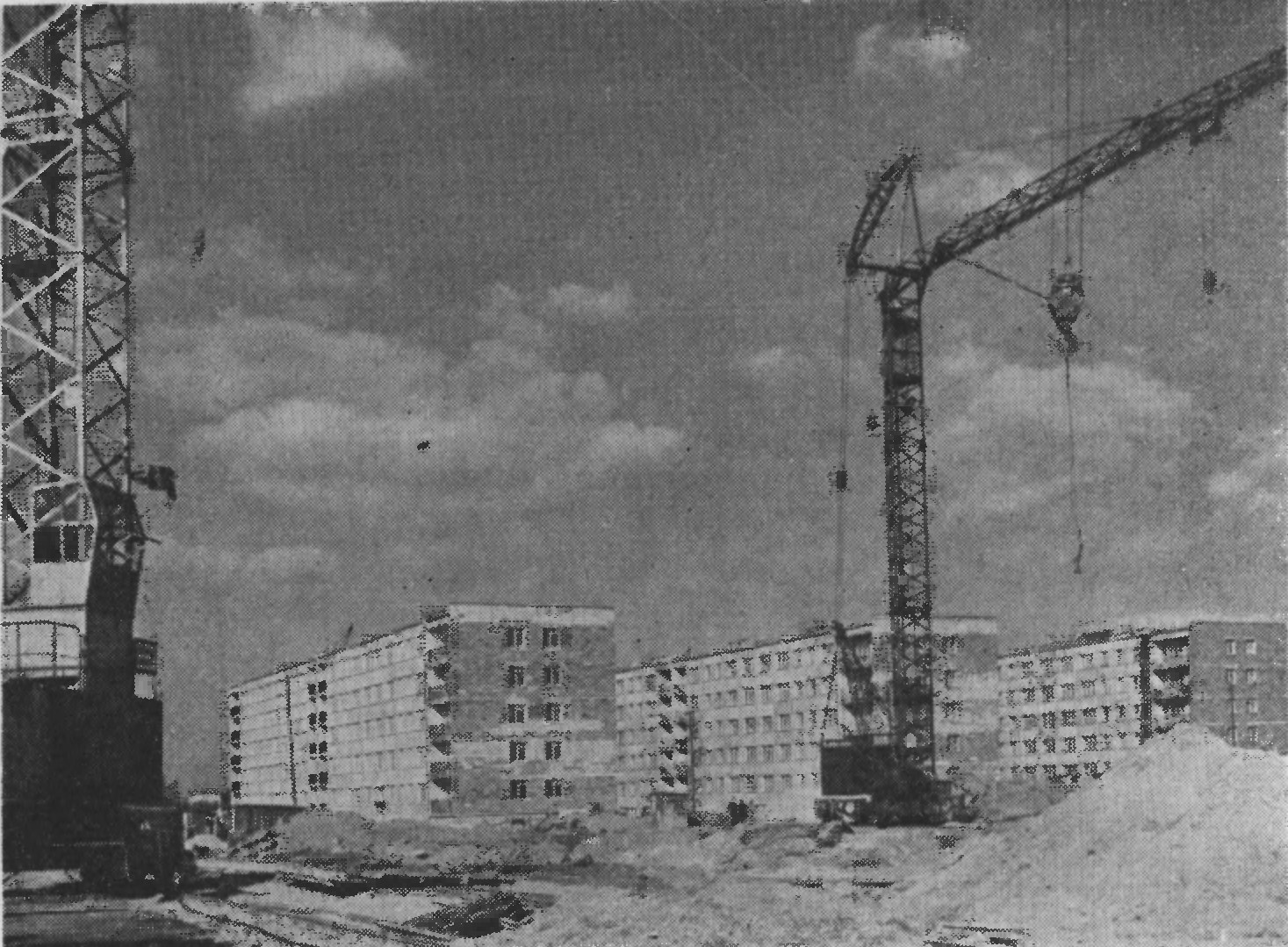 Zespół A-3. Budynki wzniesione w 1968